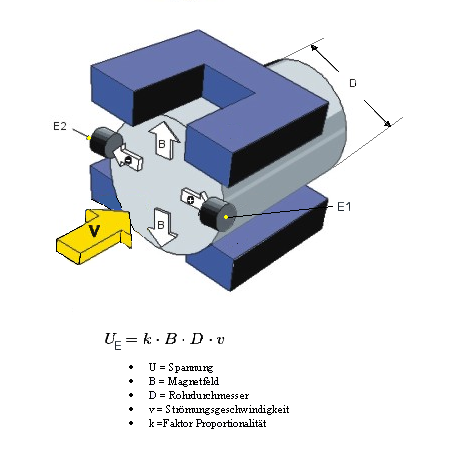 Magnet Feld Durchflussmesser Spannung